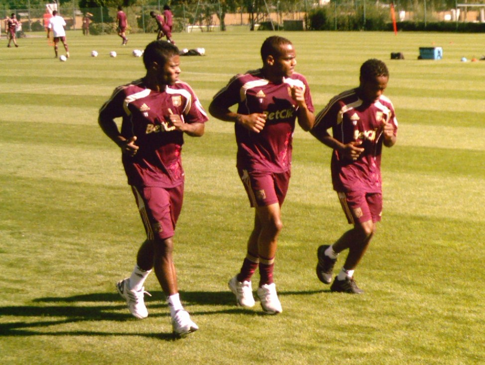 Michel Bastos, Jimmy Briand, Jean II Makoun lors d'une séance d'entrainement de l'OL en 2010.